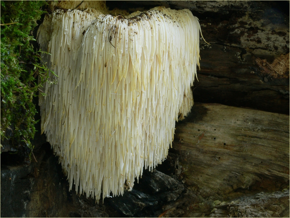 Igelstachelbart (Hericium erinaceus)